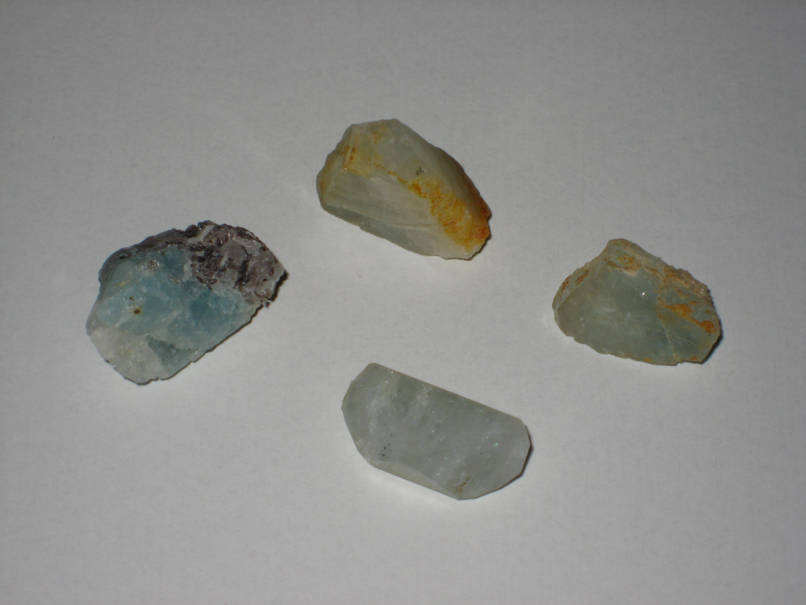 Neljä topaasikidettä Eräjärven Viitaniemen maasälpälouhoksesta.